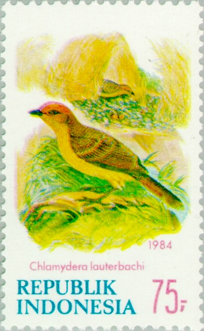 Chlamydera lauterbachi